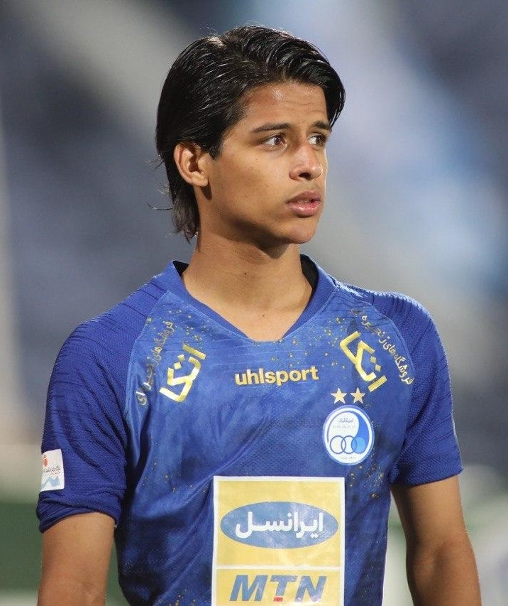 تصاویر بازی استقلال و سایپا در چارچوب هفته بیست و دوم لیگ نوزدهم برتر فوتبال که با تساوی یک بر یک به پایان رسید